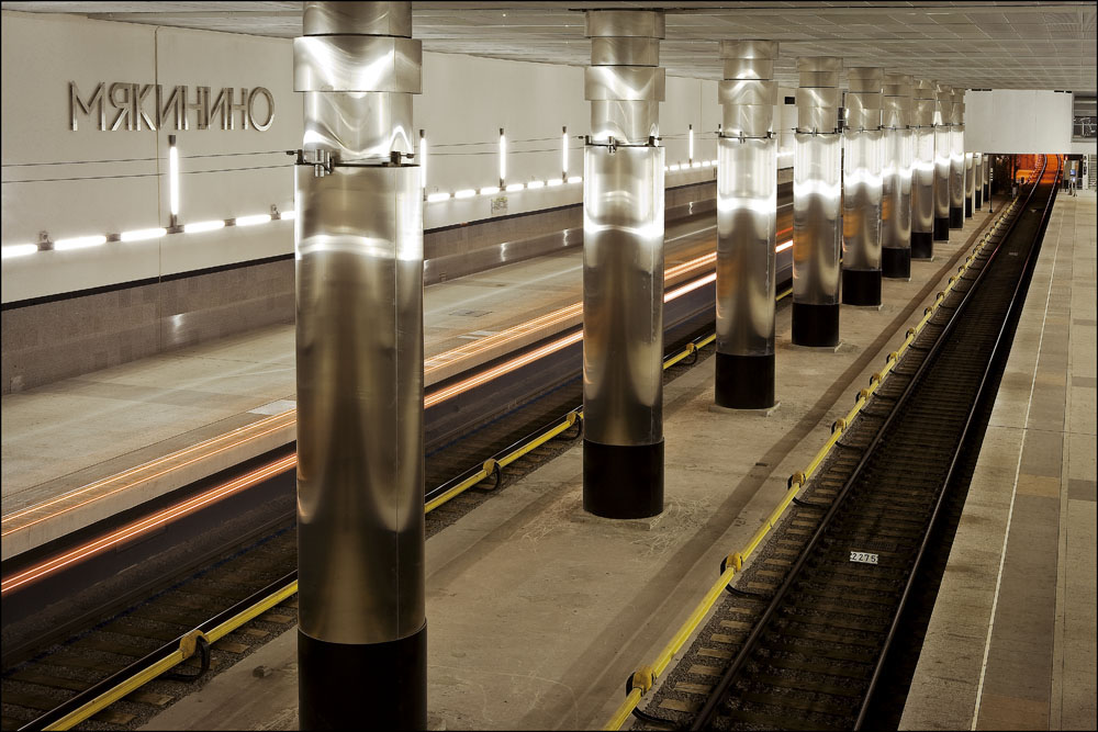 Станция метро "Мякинино"